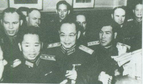 1957年，叶剑英和刘亚楼出访苏联。